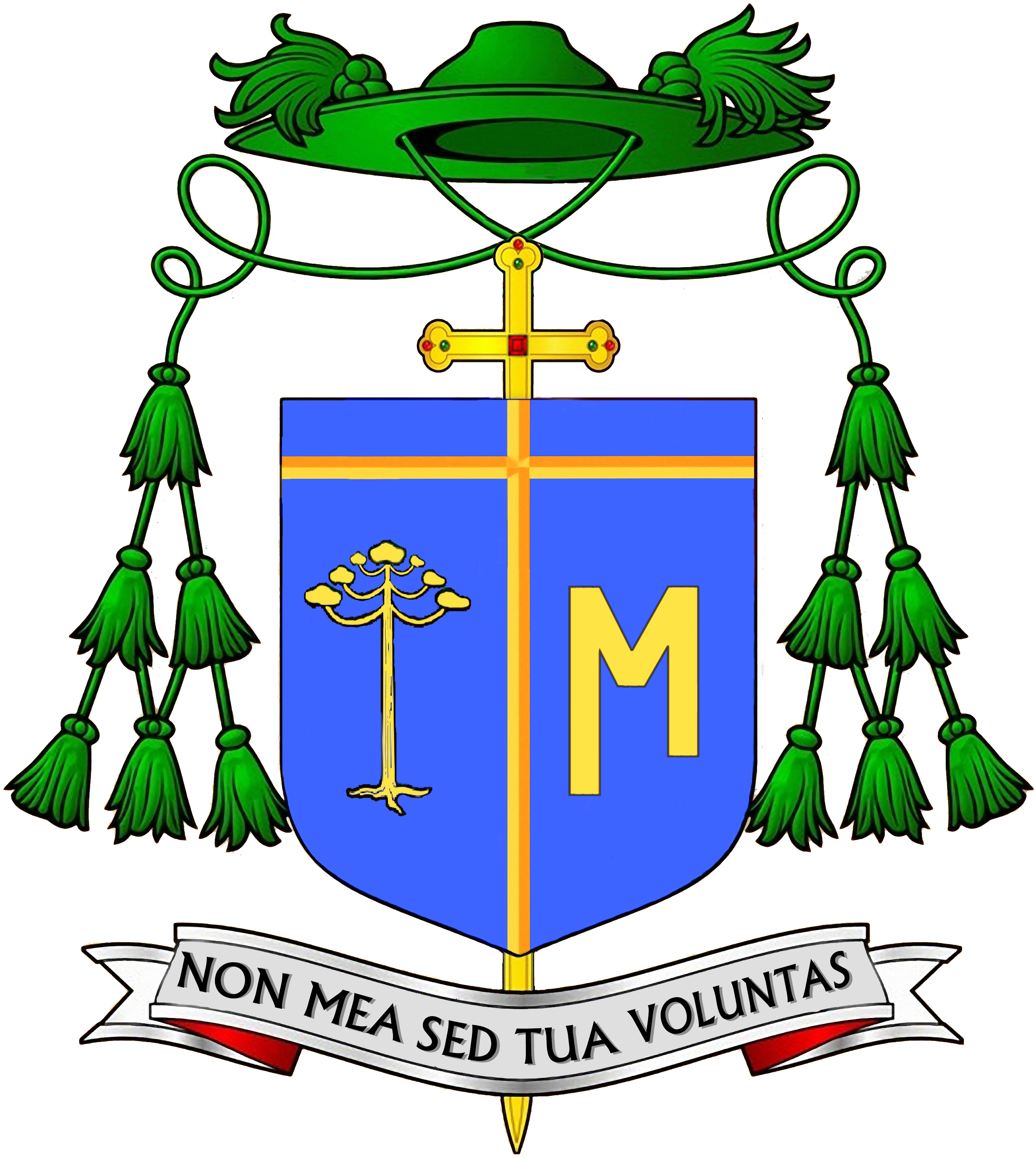 Brasão Dom Levi